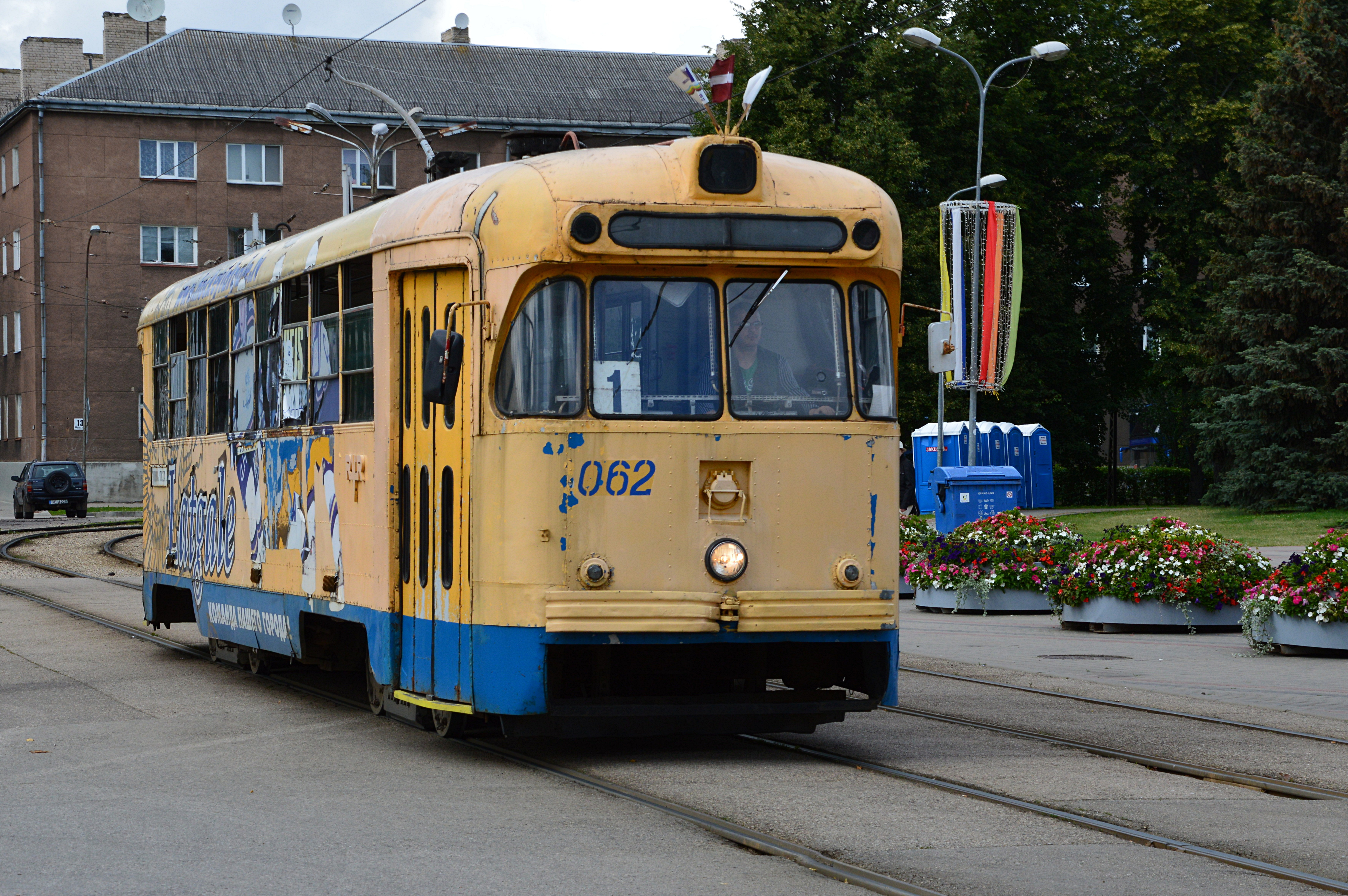 RVZ-6 tramm Daugavpilsi linnas Lätis.